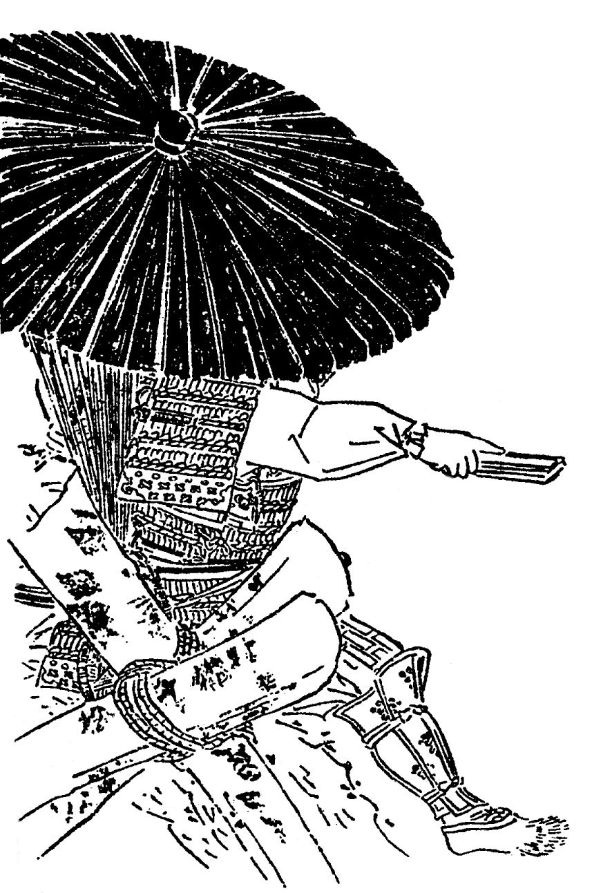 山田重忠。平安時代末期 - 鎌倉時代前期の武将。／江戸時代『前賢故実』より。画：菊池容斎